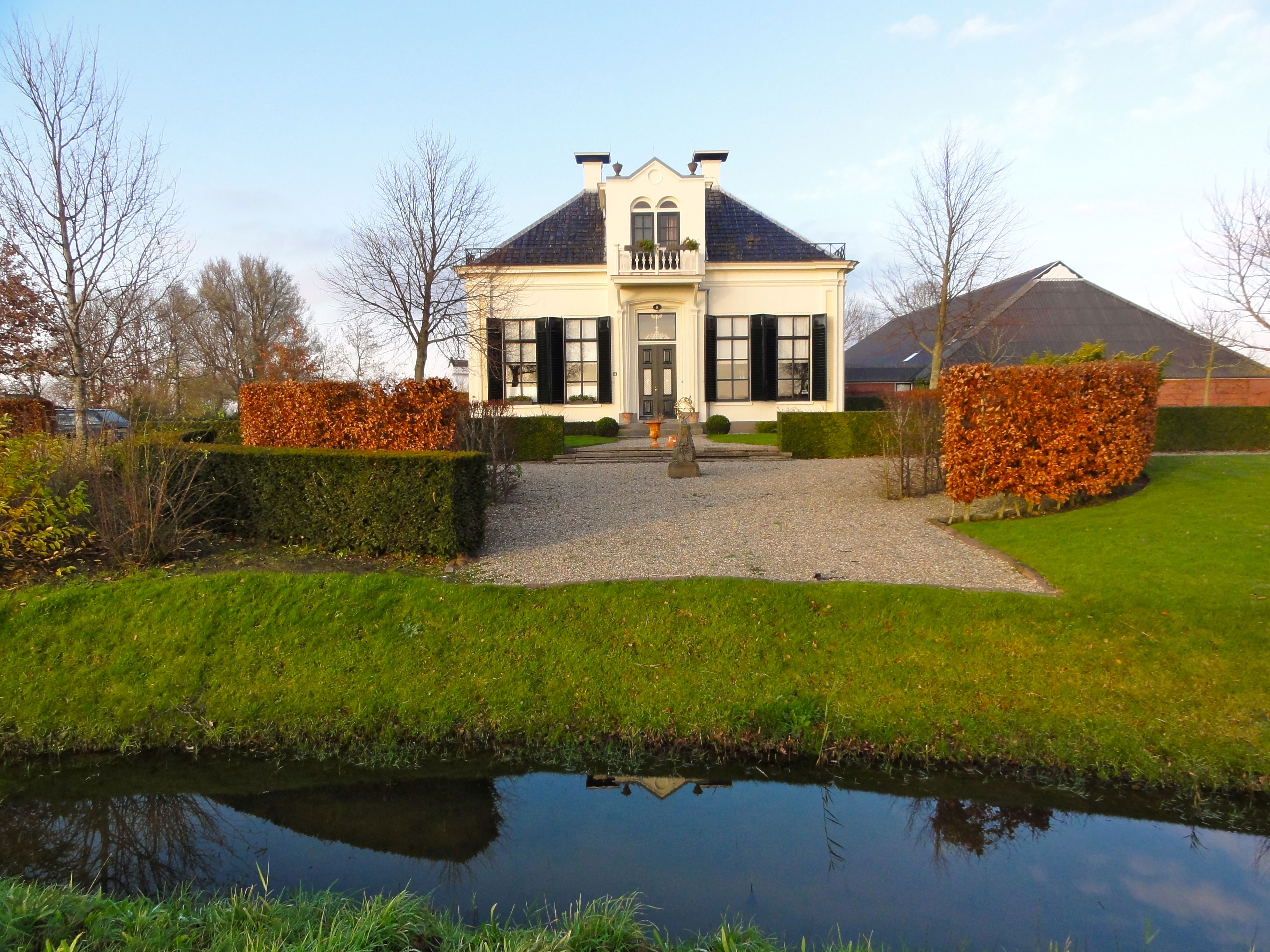 Museumboerderij Welgelegen in Leens